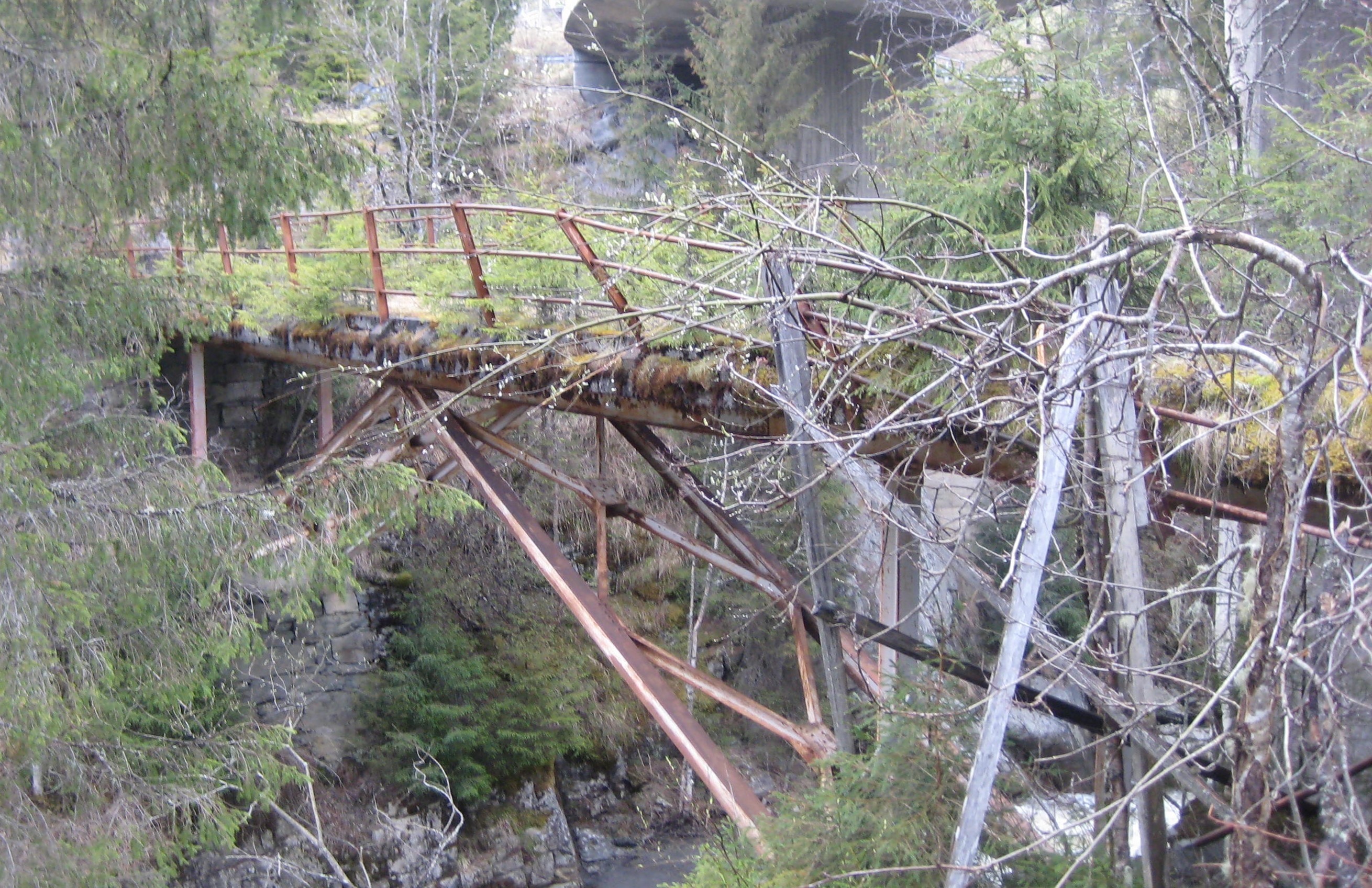 gamle Kjøljubrua